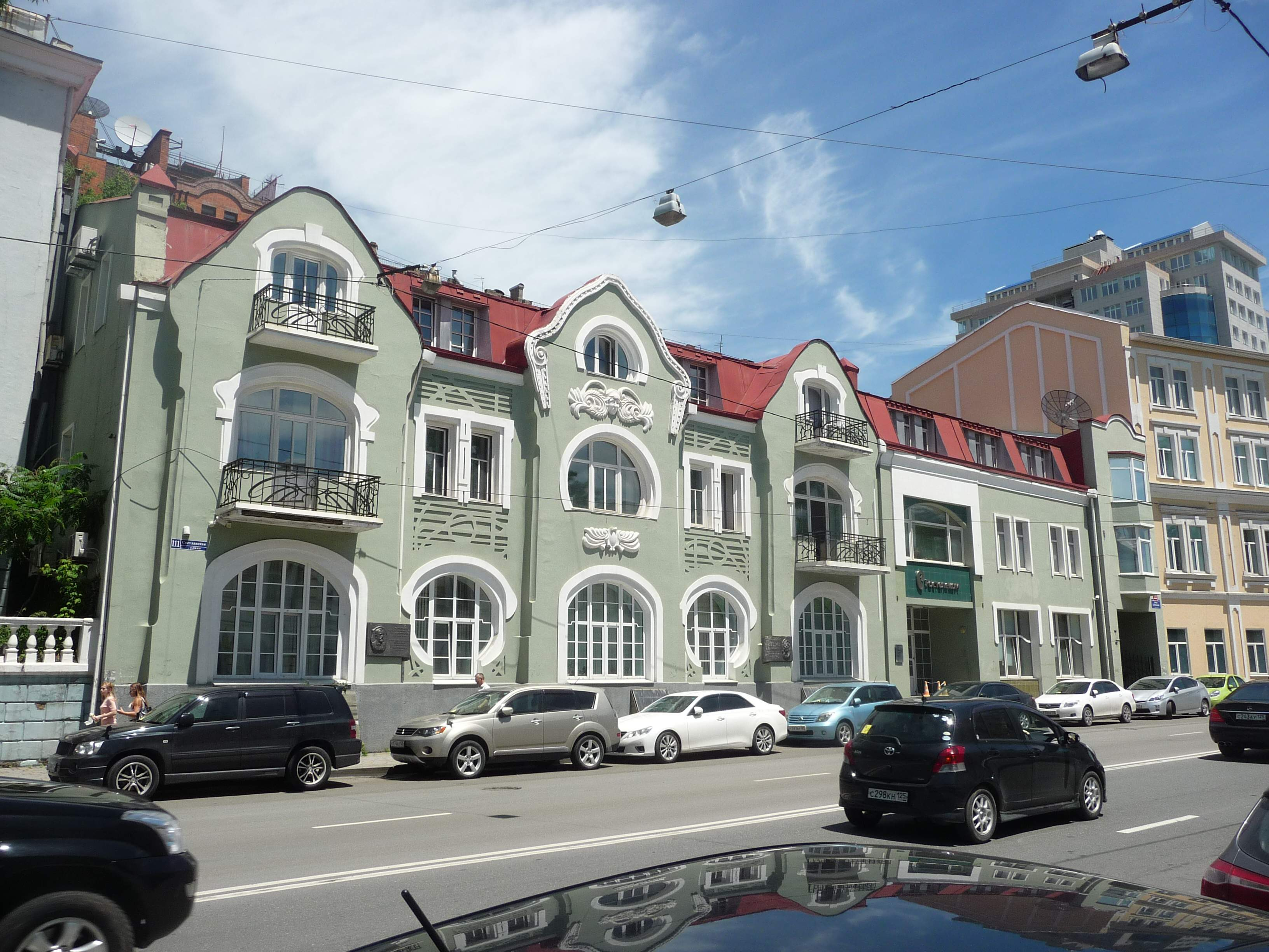 Владивосток, Светланская 111, 2015-06-30